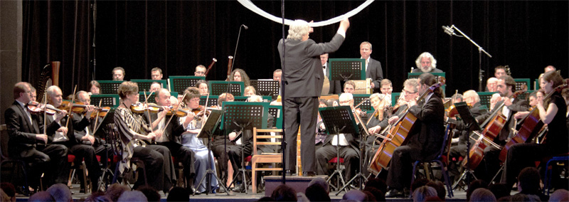 Uměleckou činnost orchestru zajišťuje Společnost pro symfonickou a komorní hudbu. Současným šéfdirigentem je Zdeněk Smolka.